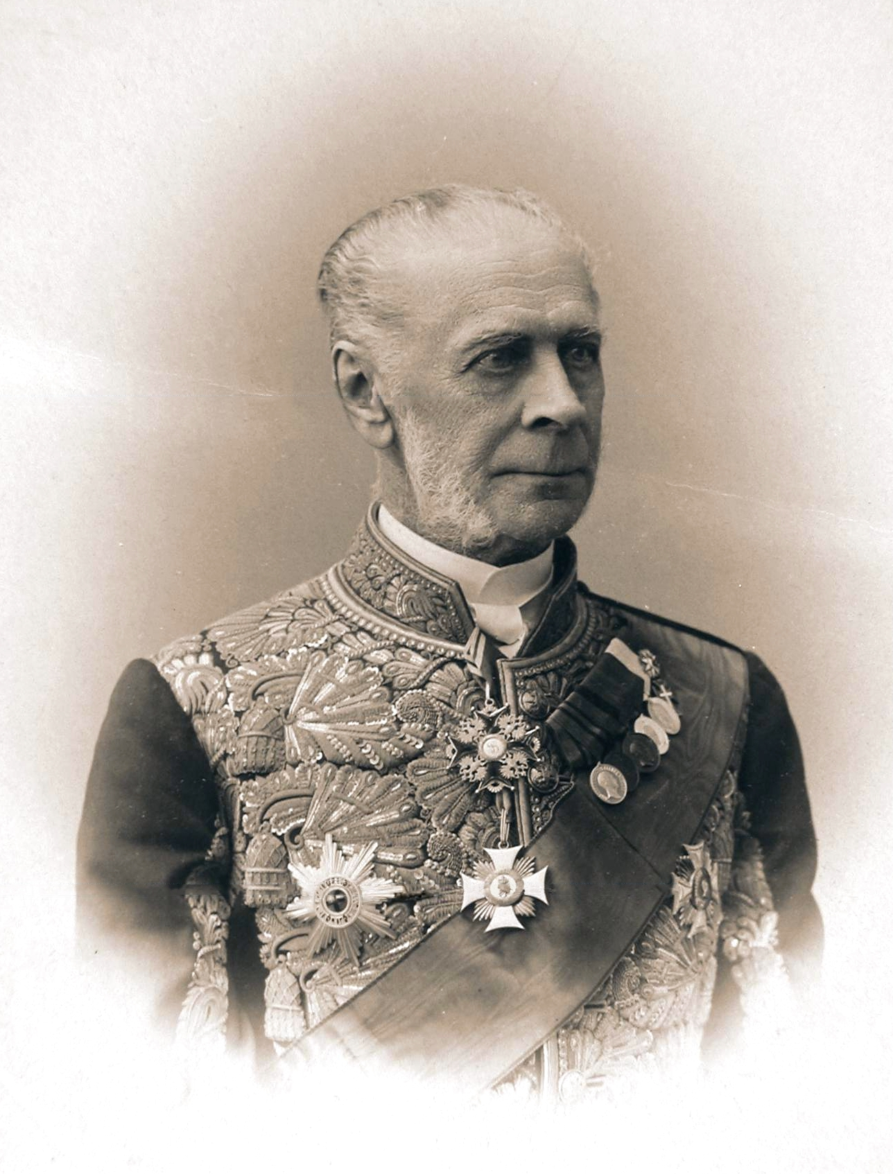 Строганов Павел Сергеевич (1823-1911) - граф, действительный тайный советник, обер-шенк Двора его императорского величества, член Государственного Совета Российской империи